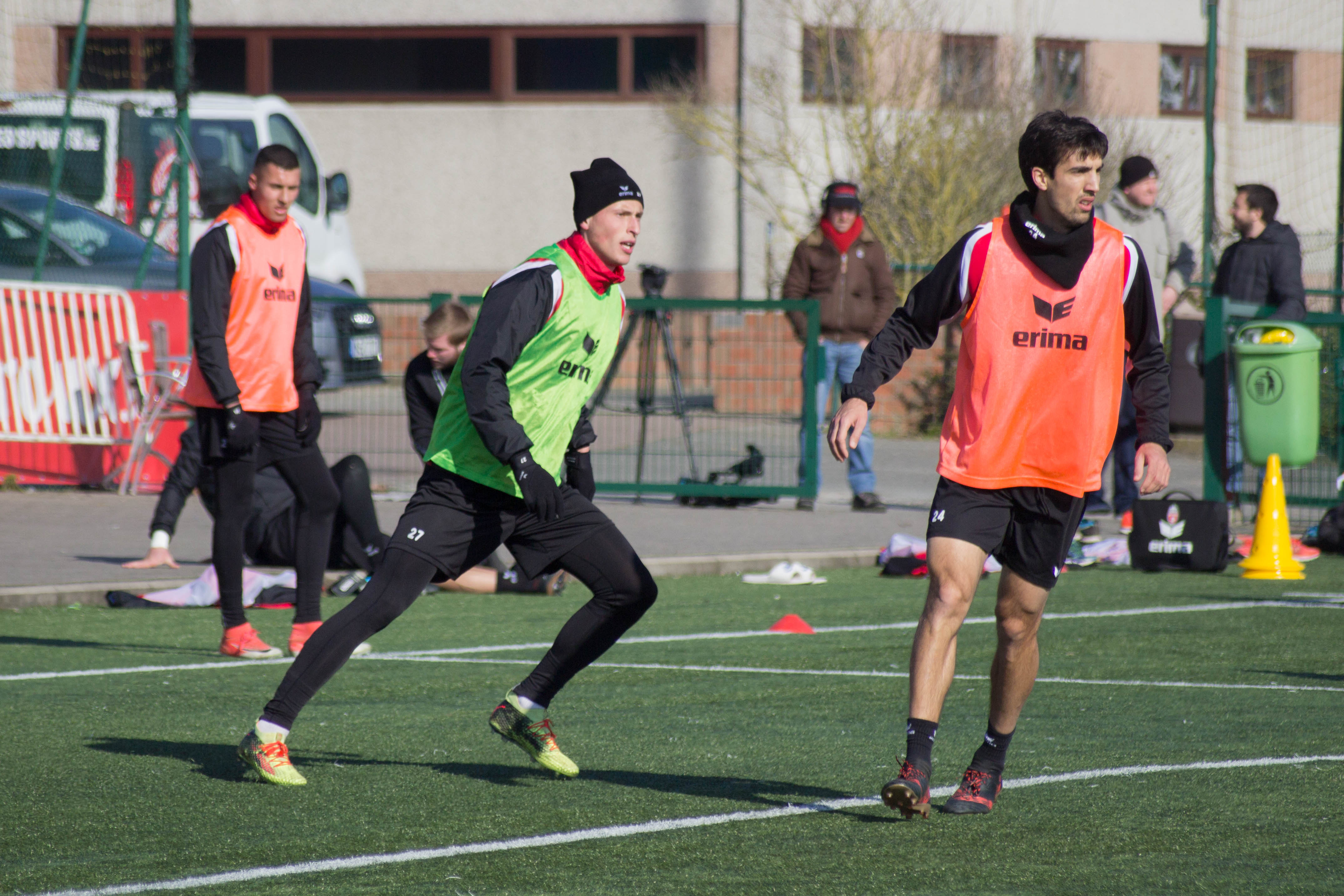 Entraînement du Royal Excel Mouscron, au Futurosport( Mouscron). Le 22 février 2018.